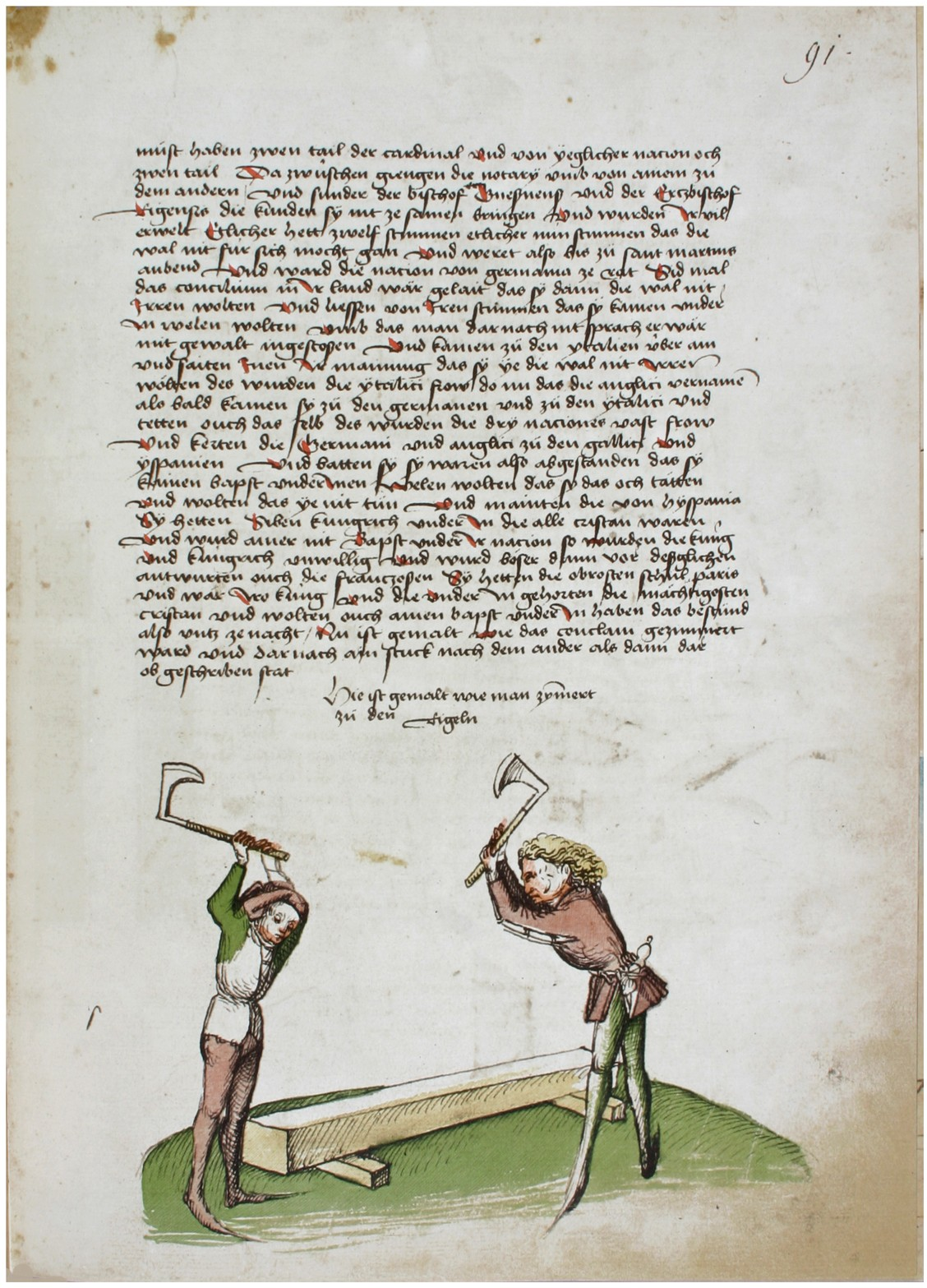 Rosgartenmuseum Konstanz, Hs. 1, Richental: Konzilschronik. In: Feger, Otto (Bearb.): Ulrich Richental: Das Konzil zu Konstanz. Faksimile. Starnberg - Konstanz 1964. Fol. 91r